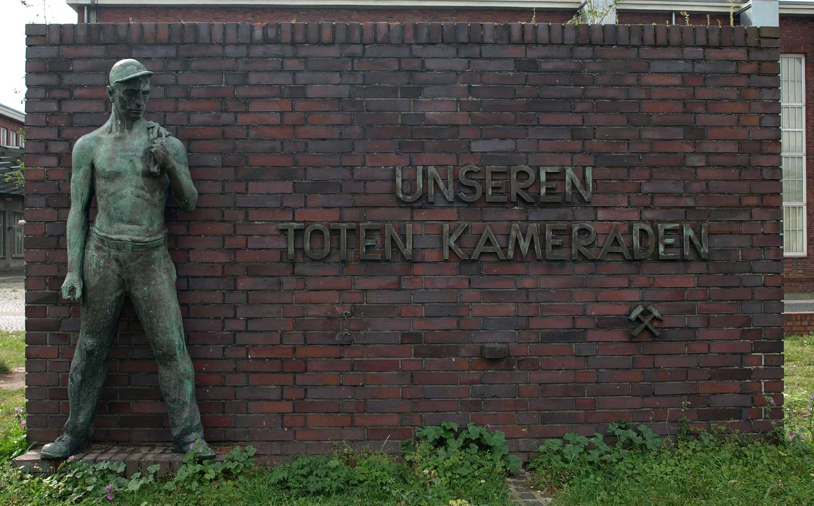 Denkmal an der ehem. Zeche Minister Stein 2009